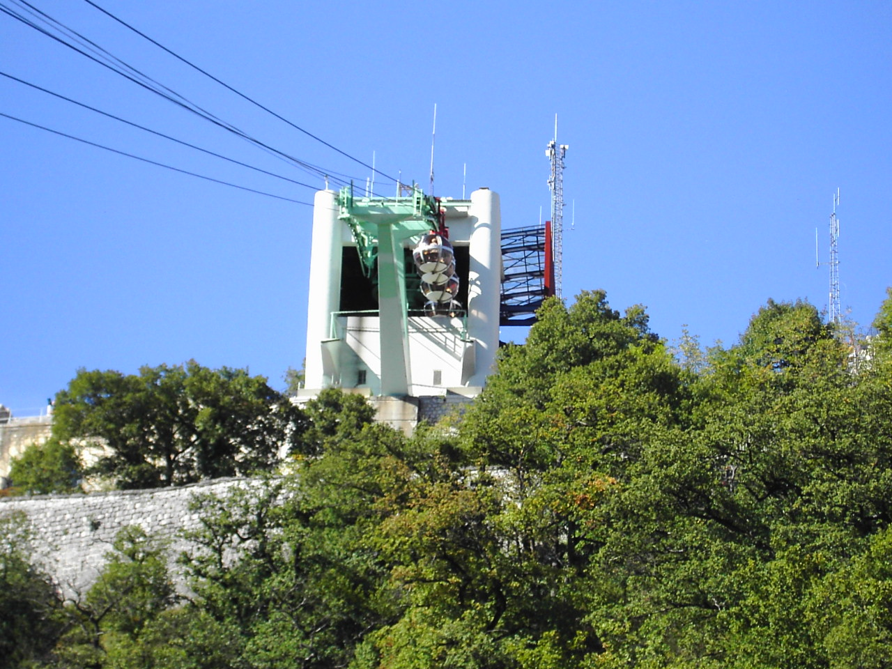 Gare d'arrivée téléphérique de Grenoble